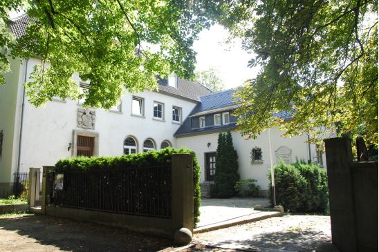 Außenansicht des Corpshauses des Corps Franconia Darmstadt im Alfred-Messel-Weg 3, Damrstadt